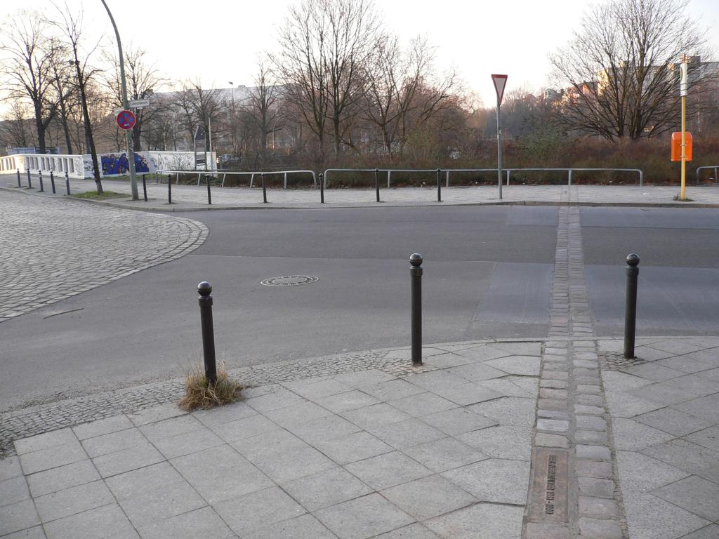 Berlin – Kennzeichnung des Verlaufs der ehemalige Berliner Mauer durch Bodentafel und Kopfsteinpflaster; Alt-Treptow, an der Lohmühlenbrücke (Bearbeitung: herunterskaliert)